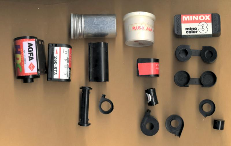 胶卷暗盒,从左到右: 35毫米,APS,特熙纳,爱迪飒,密诺斯